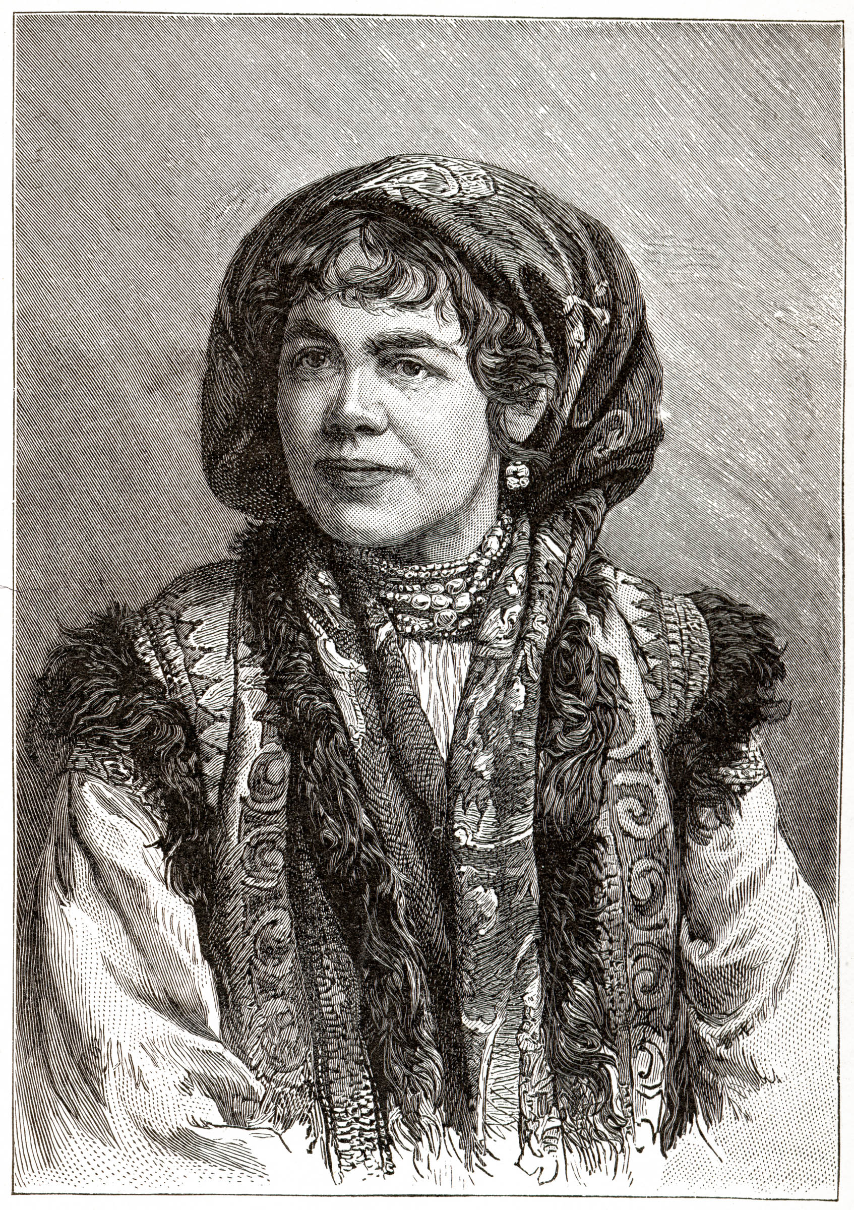 Huzulin, of the Eastern Carpathian Mountains